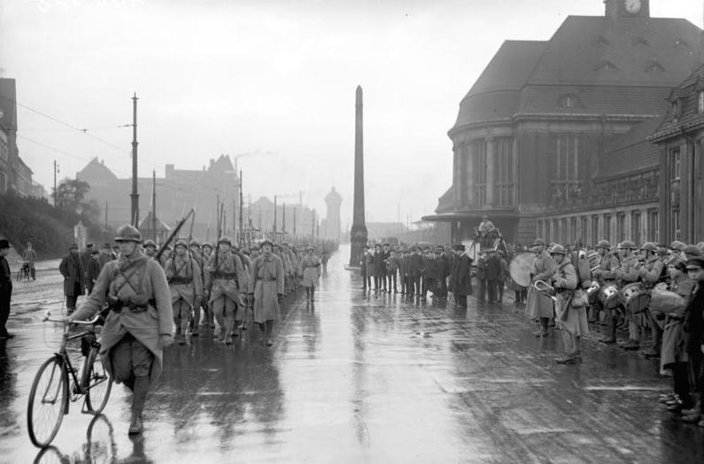 Die endgültige Räumung Dortmunds! Vorbeimarsch der abfahrenden Truppen vor dem Hauptbahnhof in Dortmund.